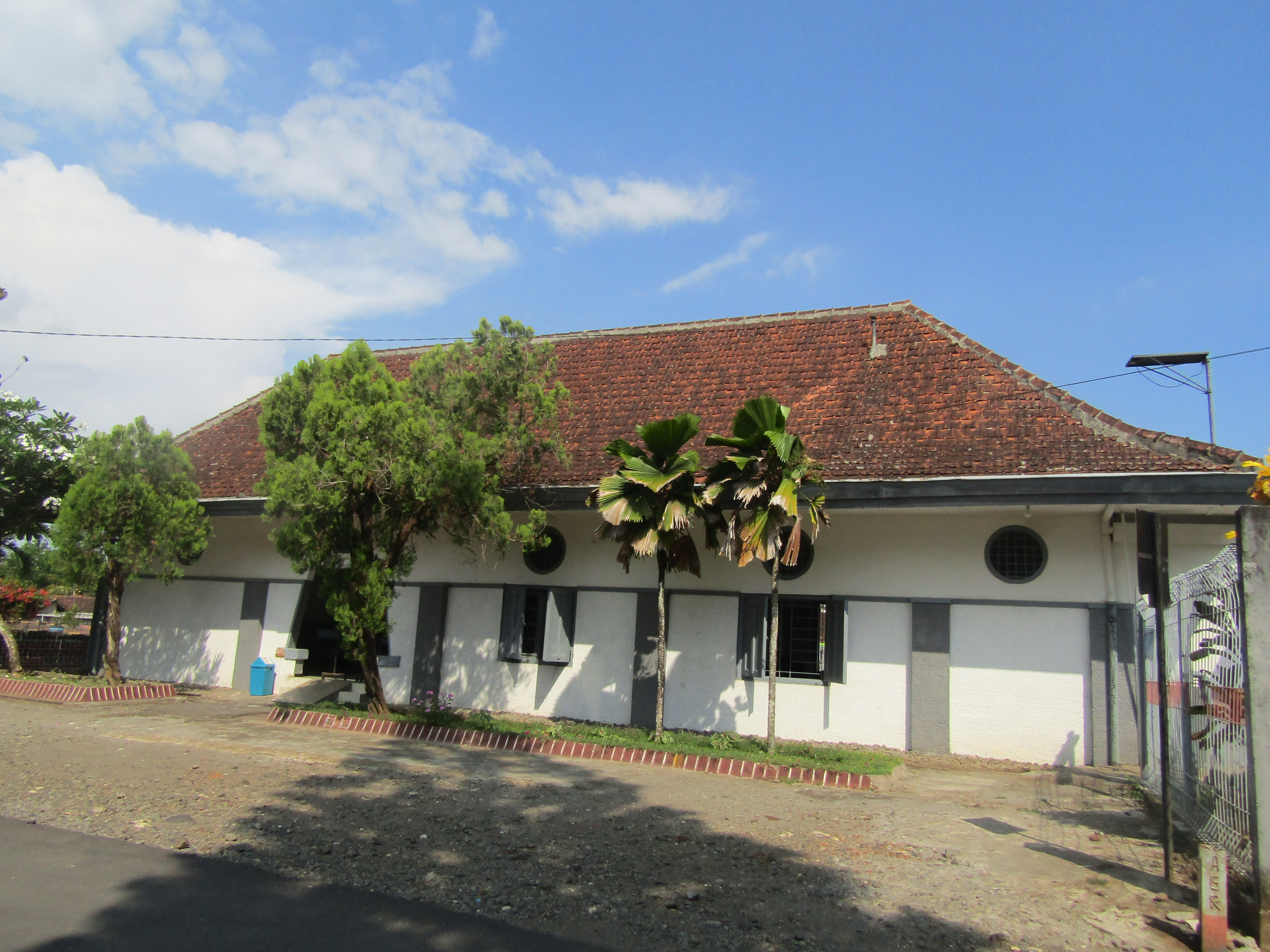 Bangunan Stasiun Sentolo, 2019